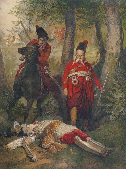 Тарас Бульба